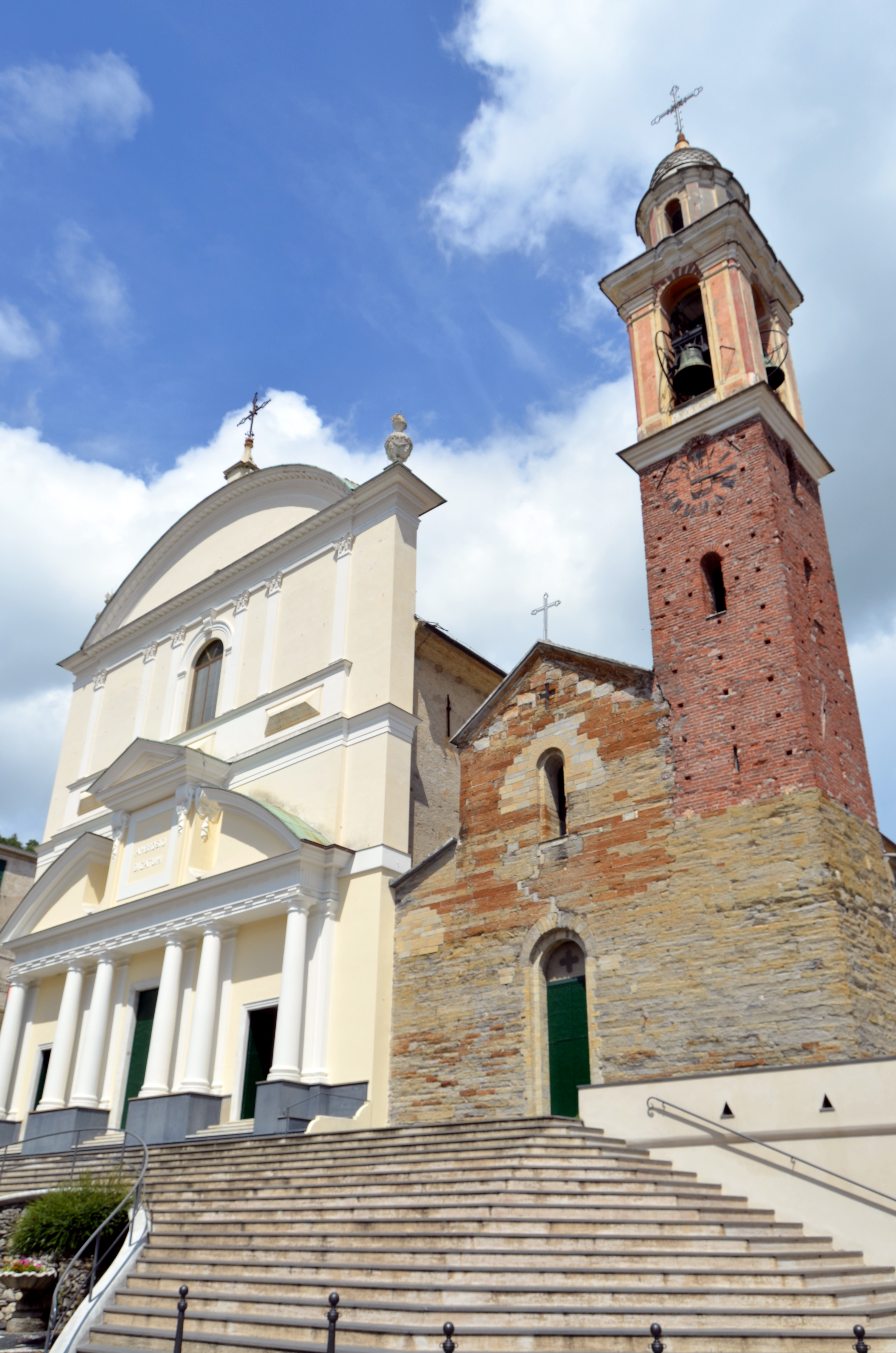 La chiesa e, a destra, l'antica pieve di Sant'Ambrogio, Uscio, Liguria, Italia